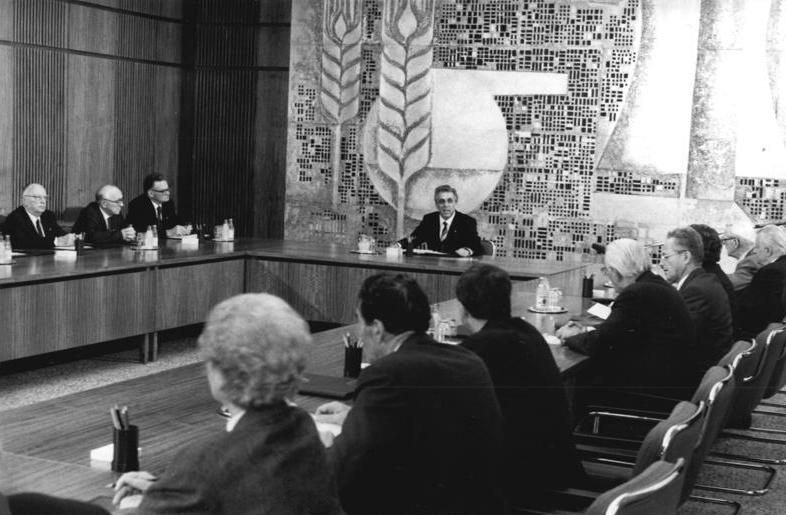 ADN-ZB Oberst-24.10.89-Berlin: Staatsratssitzung Egon Kranz, Vorsitzender des Staatsrates und des Nationalen Verteidigungsrates der DDR, begrüßte die Mitglieder des Staatsrates zur ersten Sitzung nach der 10. Volkskammertagung.